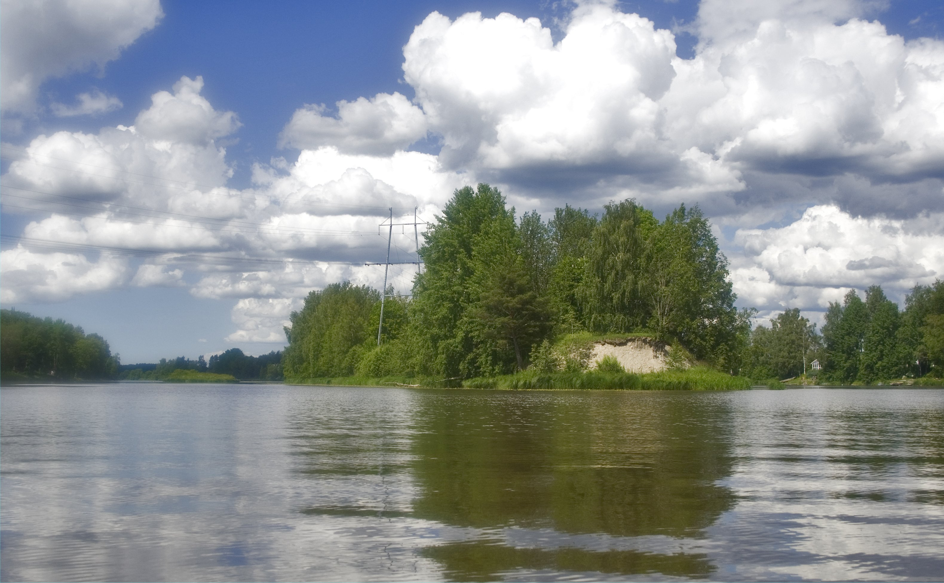 Kokemäenjoen Isoluoto; sijainnut perimätiedon mukaan Kokemäen kartanon päärakennus ja sinne johtanut silta